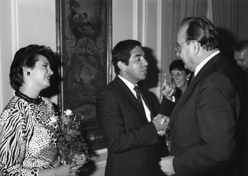 Bonn, 25. Mai 1987 Vom 25. bis 28. Mai 1987 statteten der Präsident der Republik Costa Rica, Dr. Oscar Arias Sanchez, und Frau Margarita Penon de Arias der Bundesrepublik Deutschland einen Staatsbesuch ab. Sie wurden von dem Minister für auswärtige Beziehung und Kultur, Rodrigo Madrigal Nieto, dem Minister für Rohstoffe, Energie und Bergbau, Dr. Alvara Umana Quesada, und dem Minister für Planung und Wirtschaftspolitik, Dr. Otton Solis Fallas, begleitet. Während seines Aufenthalts in Bonn führte Präsident Arias politische Gespräche mit Bundespräsident Dr. Richard von Weizsäcker, Bundeskanzler Dr. Helmut Kohl, Bundesaußenminister Hans-Dietrich Genscher und weiteren Mitgliedern der Bundesregierung. Zum Abschluß besuchten die costaricanischen Gäste Berlin (West). Empfang, gegeben von der Geschäftsträgerin a.i. der Republik Costa Rica, Isabel Montero de Meissner, in der Godesberger Redoute - Präsident Arias hier im Gespräch mit Bundaußenminister Genscher (re.). li. Frau Margrita Penon de Arias